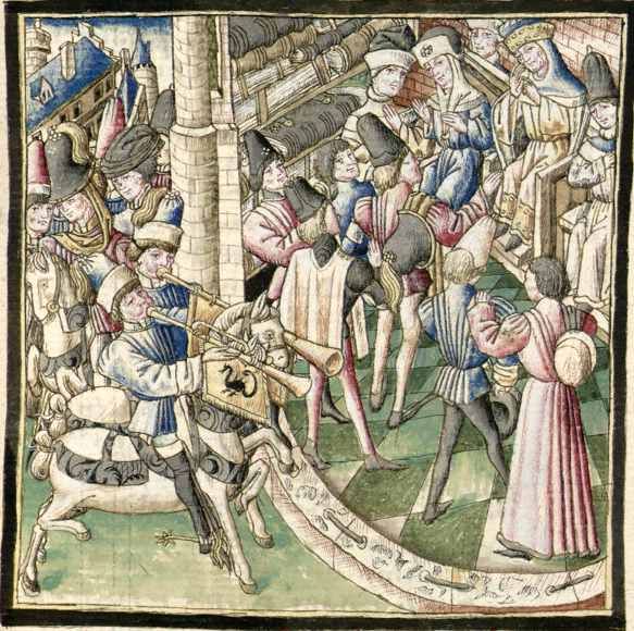 ChampionDesDames-Grenoble-Ms0352-f047r